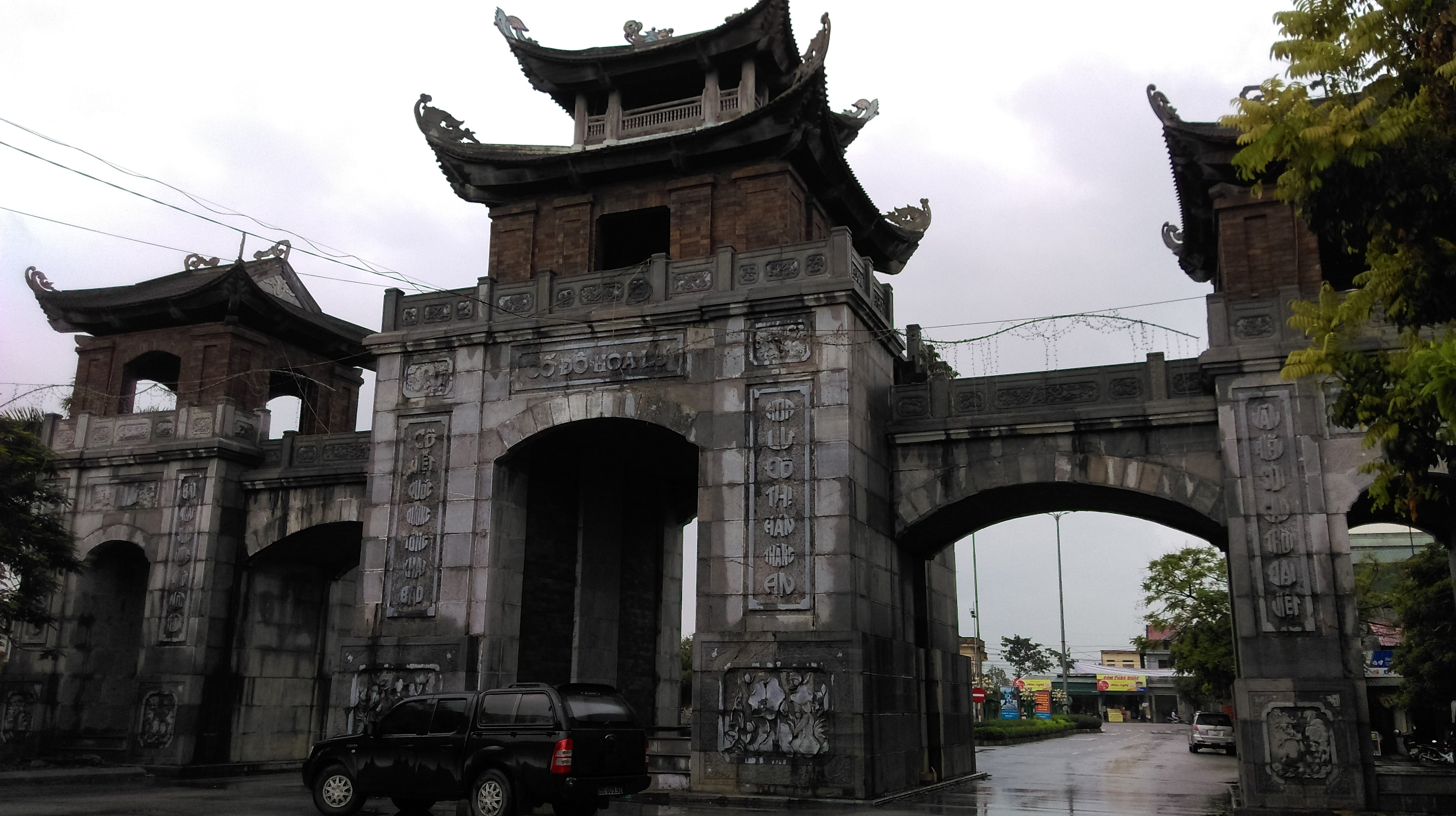 Cổng Đông Cố đô Hoa Lư, Ninh Bình